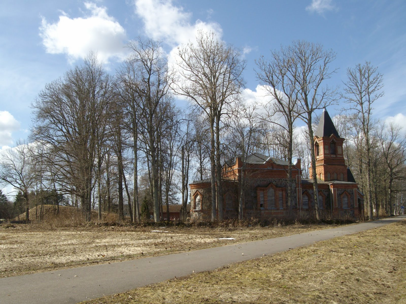 Tänassilma õigeusu kirik